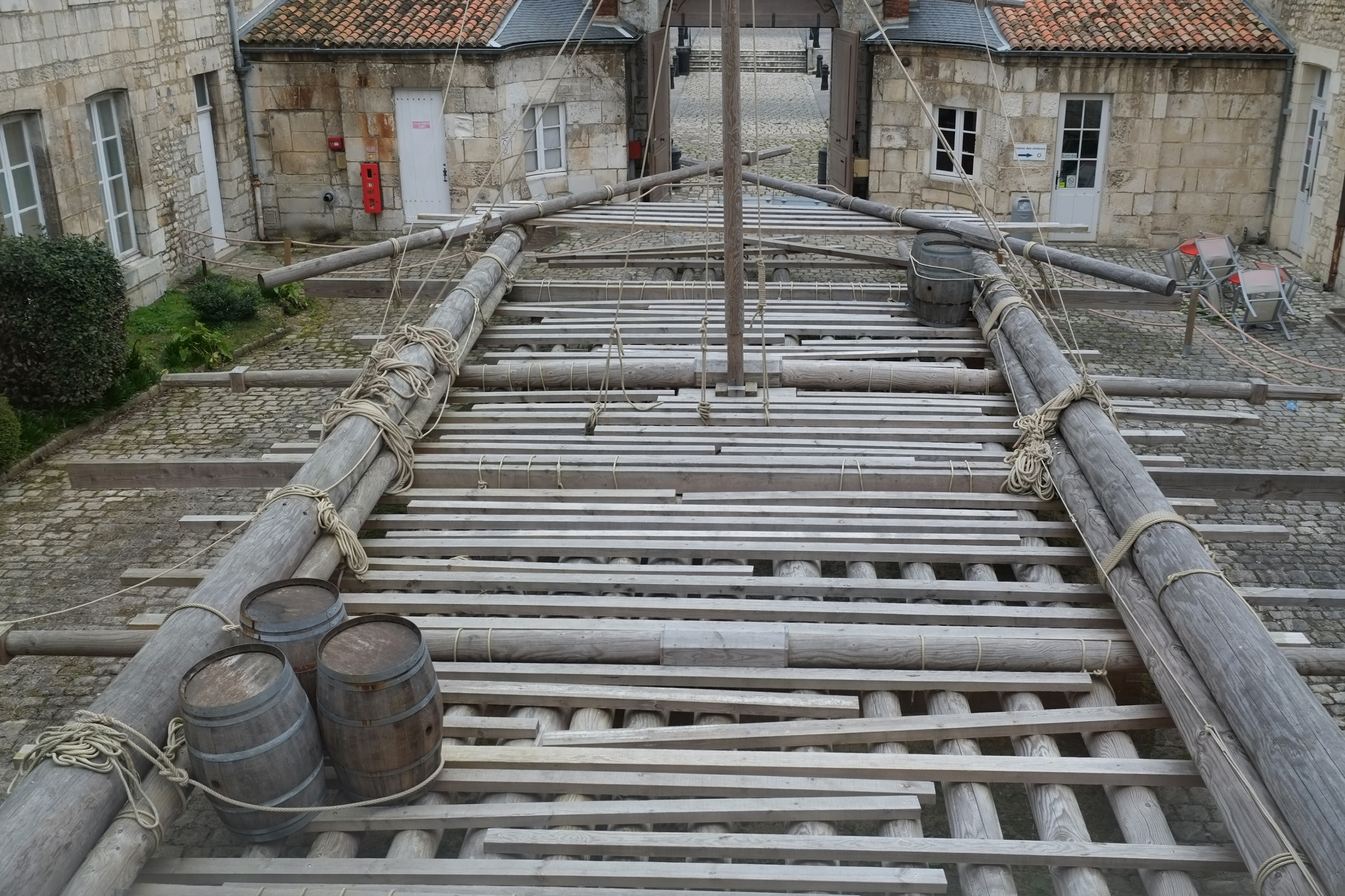 Reconstition du radeau de La Méduse à l'echelle 1 visible dans la cour du musée de la Marine à Rochefort Charente-Maritime France